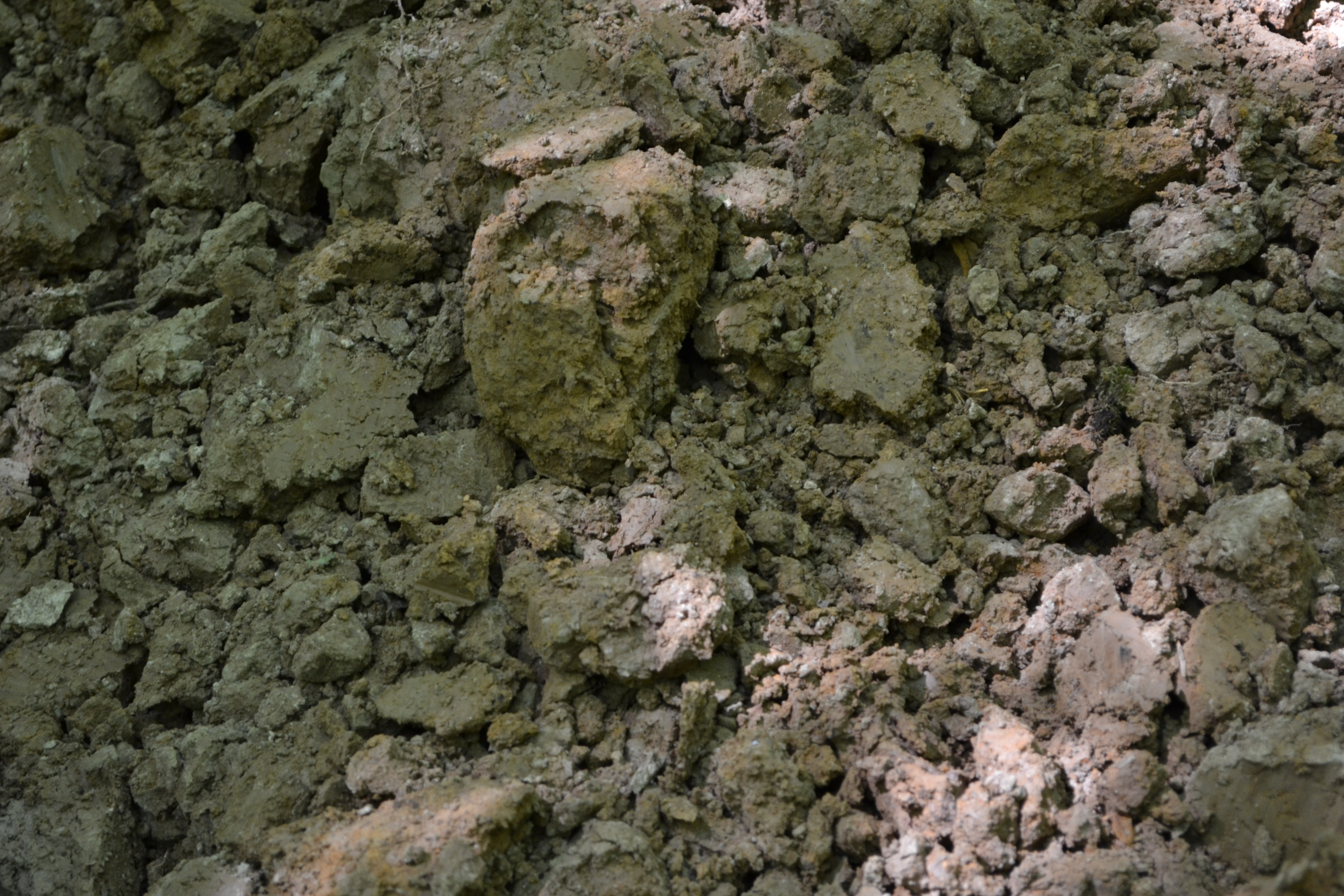 Покровный суглинок, извлечённый из шурфа